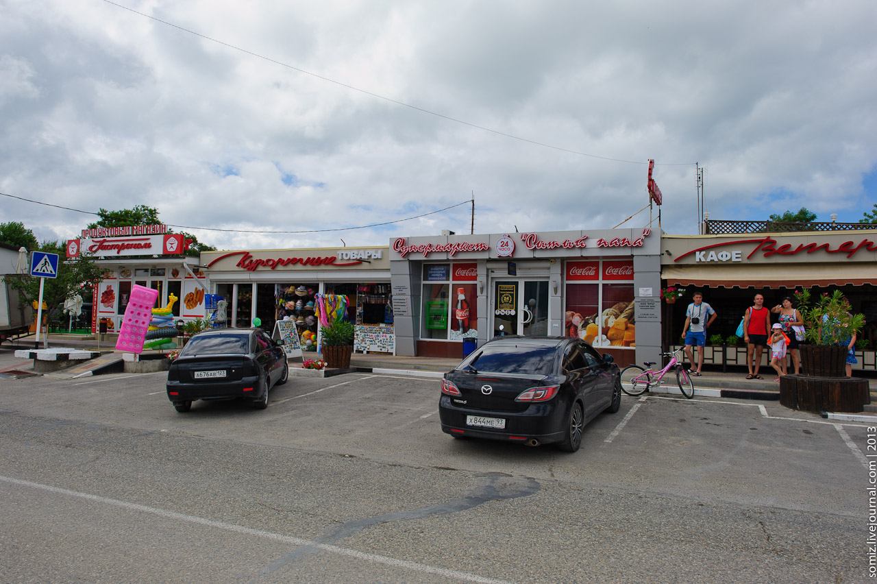 Summer 2013.